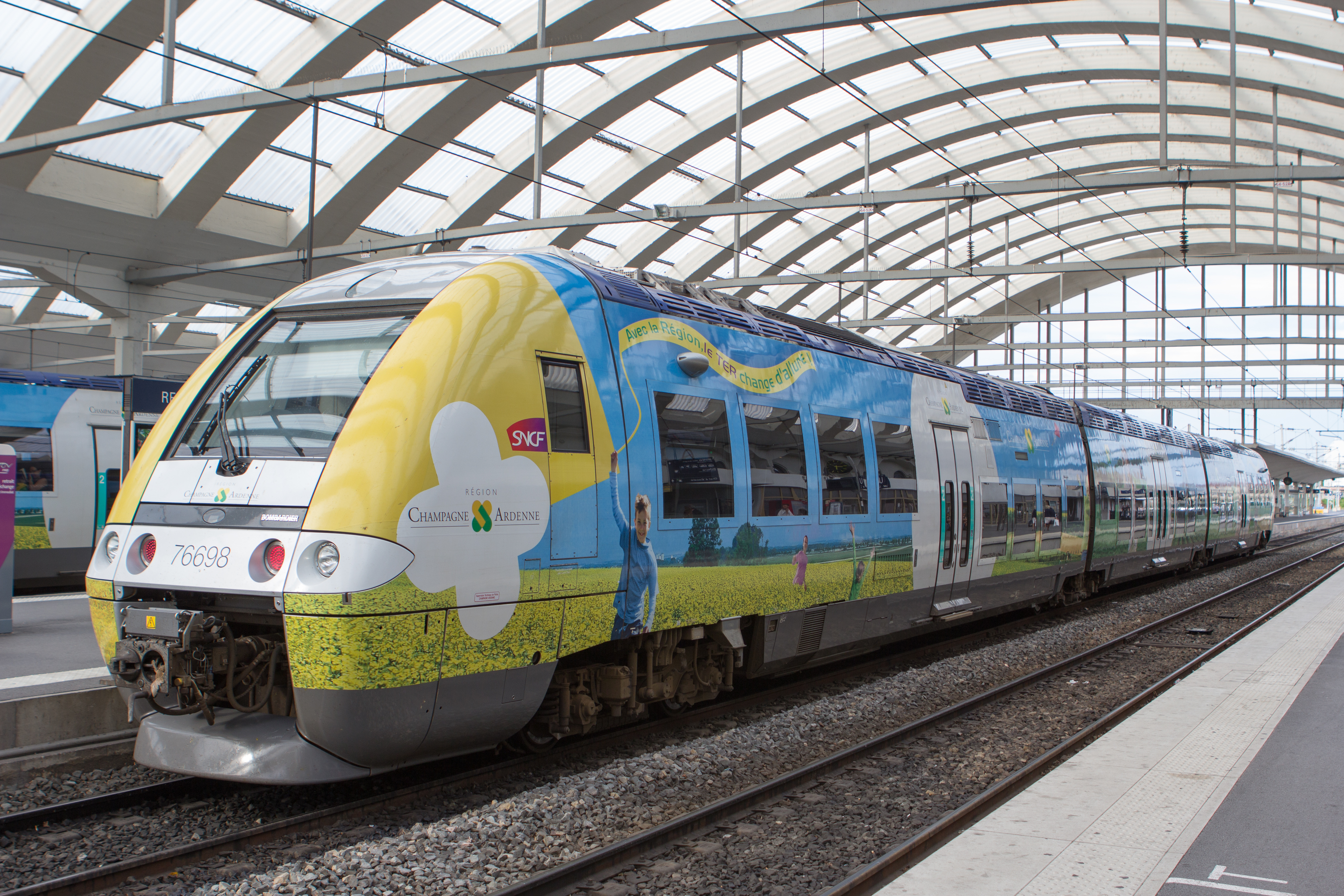 Trains TER Champagne-Ardenne dans la gare de Reims / Reims, Marne, France